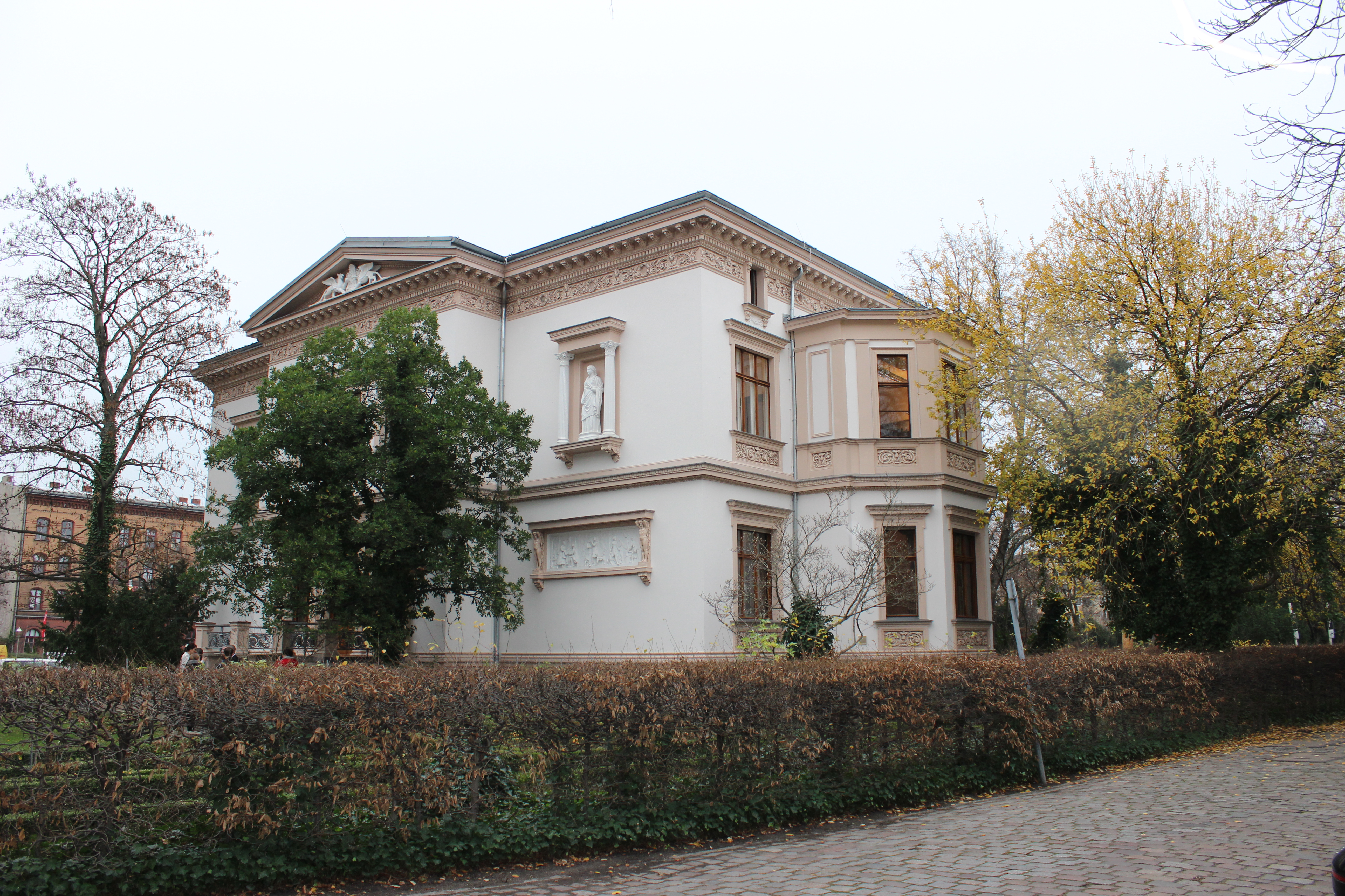 Villa Kogge, Berlin